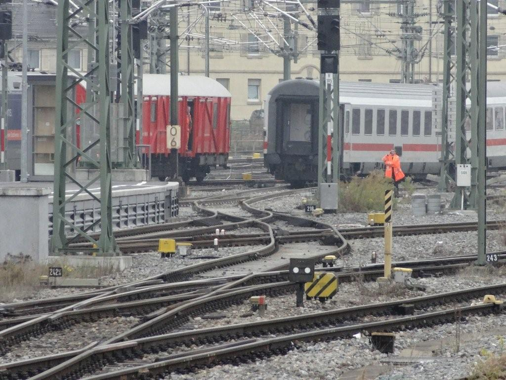 Gleisvorfeld des Stuttgarter Hauptbahnhofs; im Hintergrund Wagen eines entgleisten Zuges